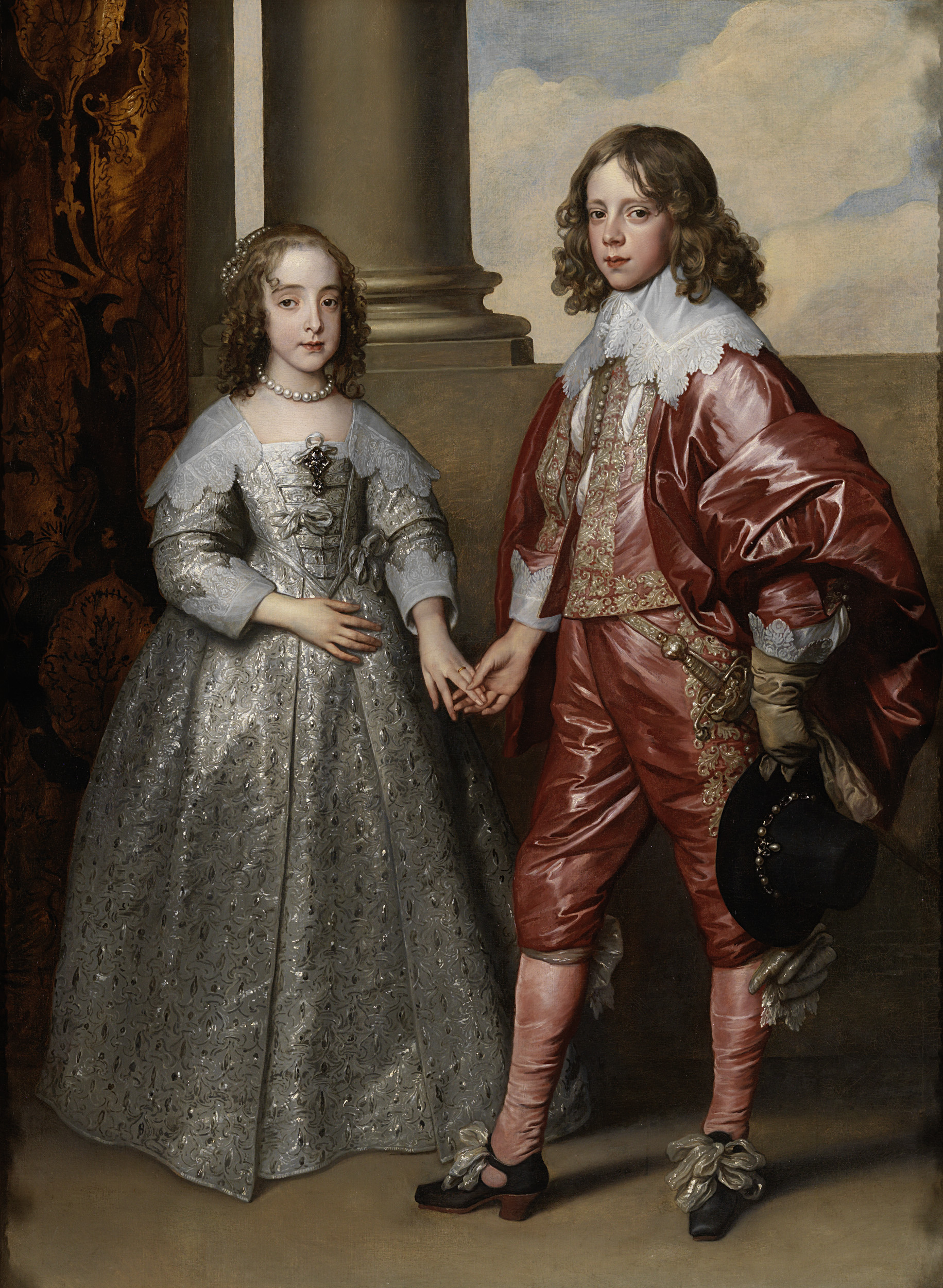 Portretten van de latere stadhouder Willem II, prins van Oranje, en zijn bruid prinses Maria Stuart, dochter van Karel I van Engeland. Staande, ten voeten uit, hand in hand voor een zuil. Vervaardigd ter gelegenheid van het huwelijk op 12 mei 1641.; Anthony van Dyck (1599–1641), olieverf op doek, 1641